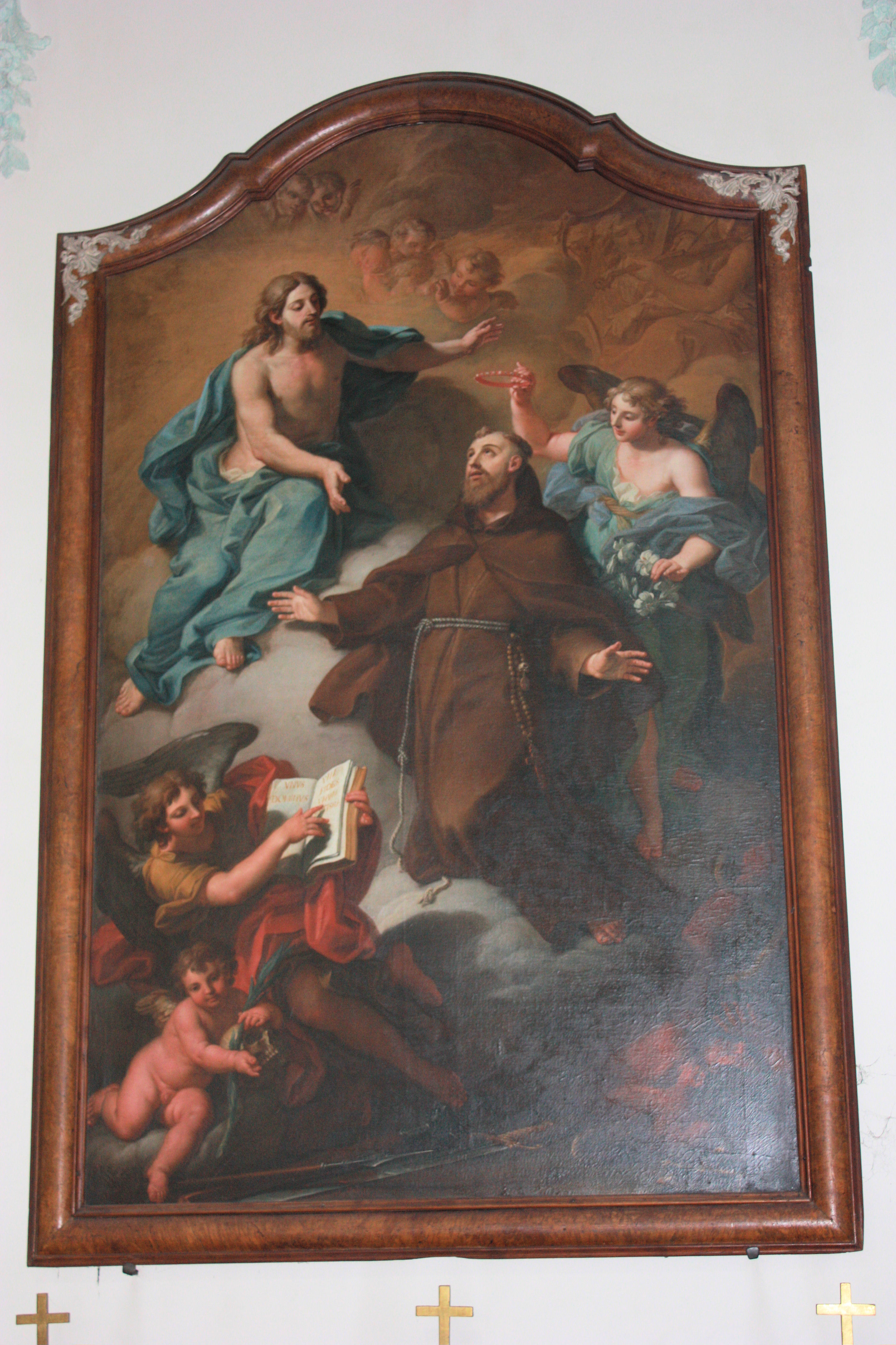 Die Apotheose des Heiligen Fidelis (Markus Roy). Altarblatt der ehemaligen Fideliskapelle des Kapuzinerklosters Rheinfelden AG, heuteSt. Martinskirche Rheinfelden. Pompeo Batoni um 1746, Format 245 x 175 cm, Stiftung der Kaiserin Maria Theresia zur Weihung der Fideliskapelle 1750. Literatur: Richard Schell: Fidelis von Sigmaringen, Der heilige in den Darstellungen der Kust aus vier Jahrhunderten, Thorbecke, 1977, S. 93